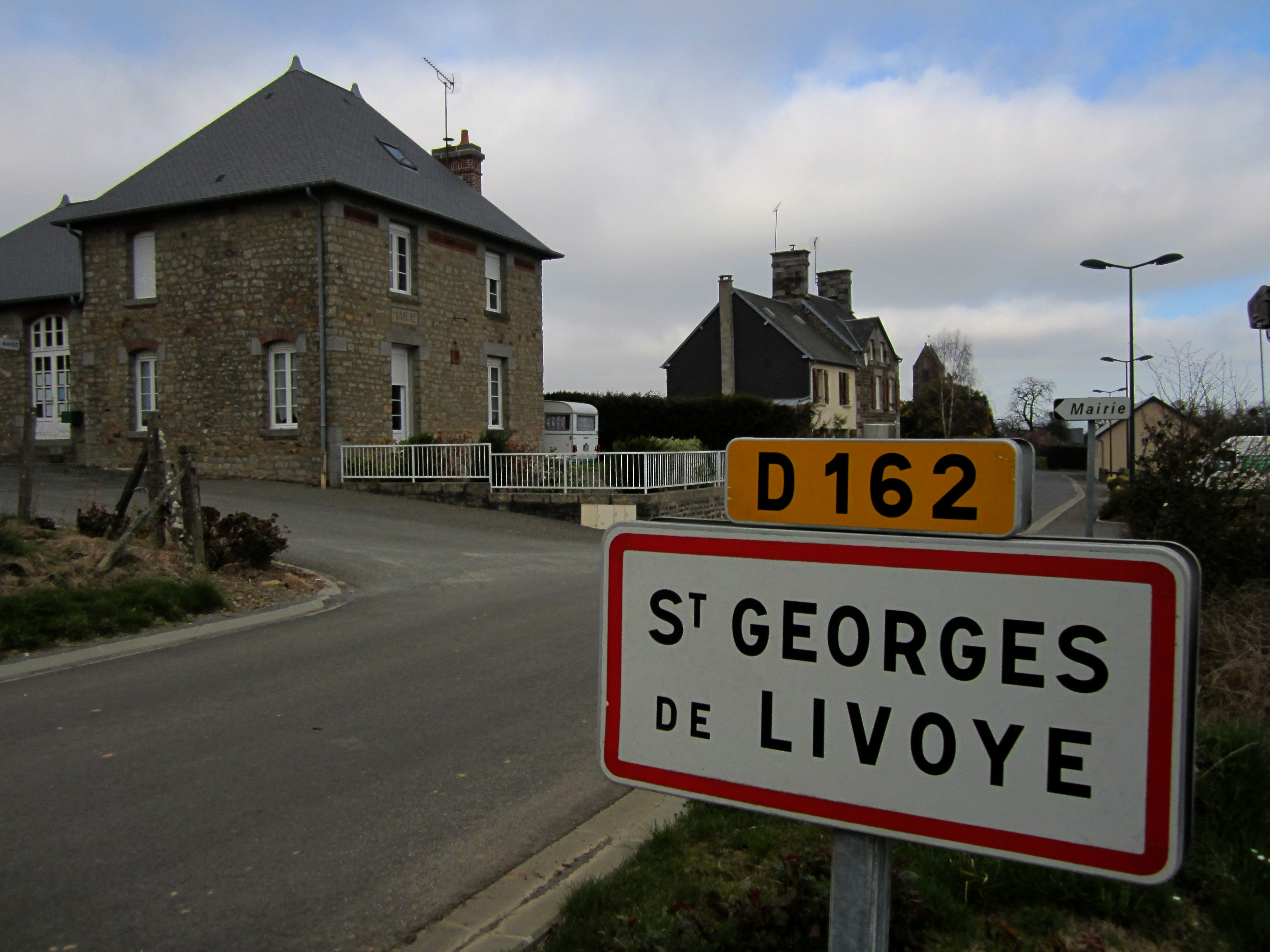 Saint-Georges-de-Livoye, Manche